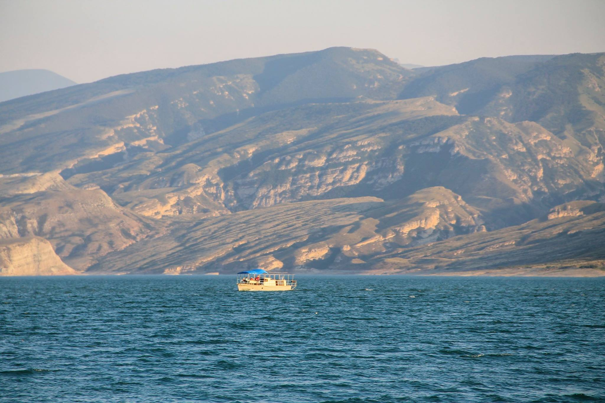 Чиркейское водохранилище